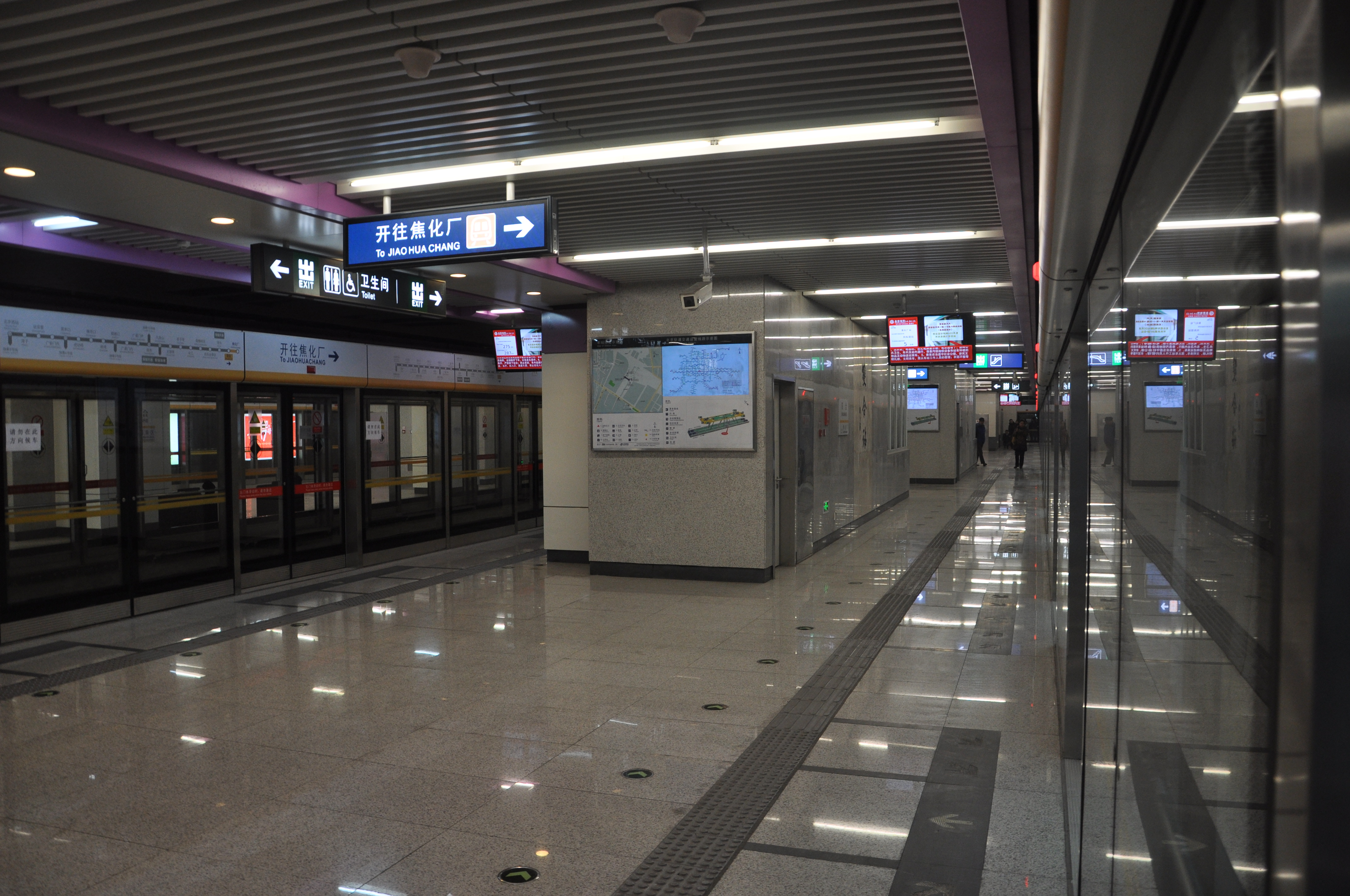 北京地铁7号线双合站站台。